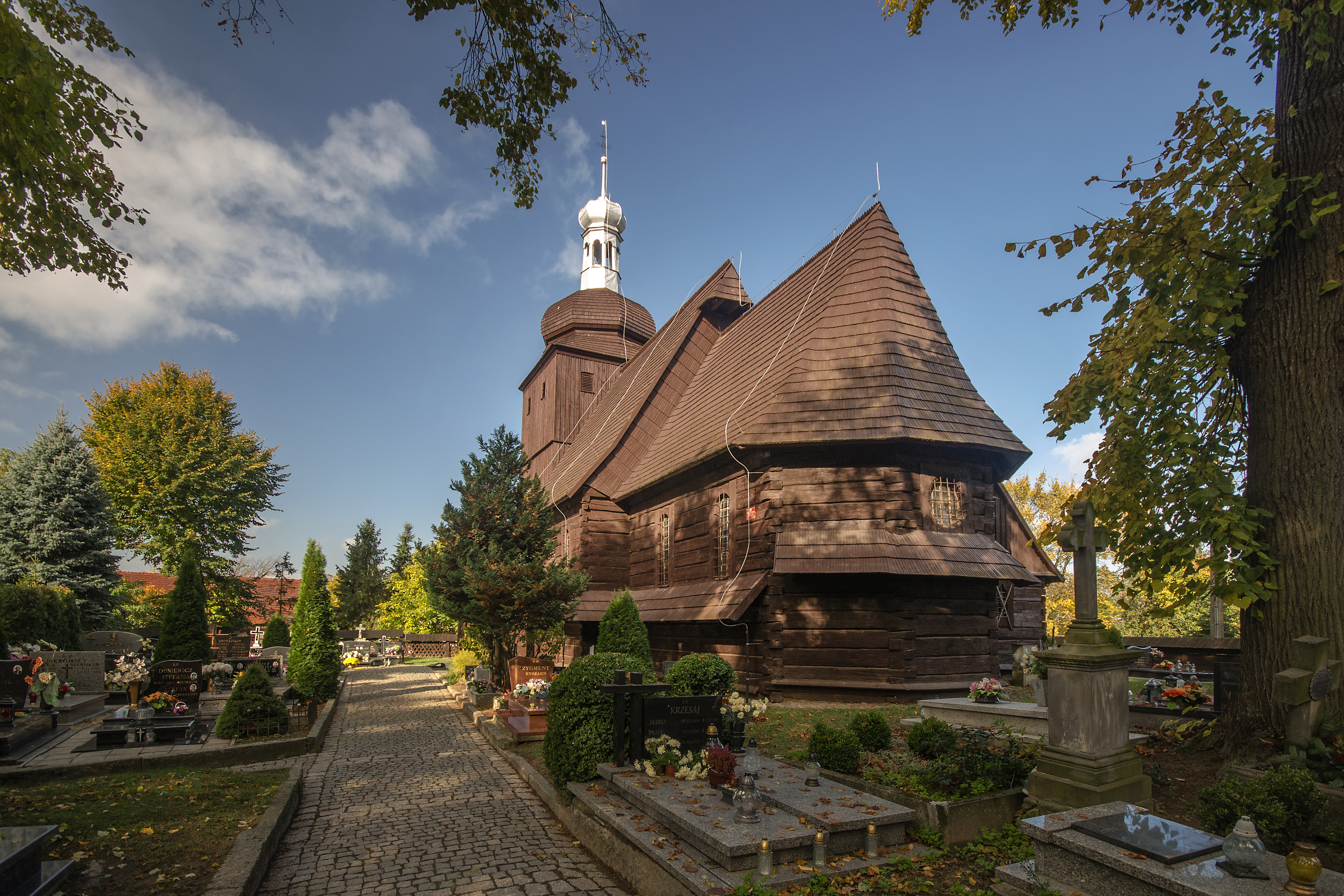 Michalice, kościół par. p.w. św. Michała Archanioła, 1614, 1668, 1736